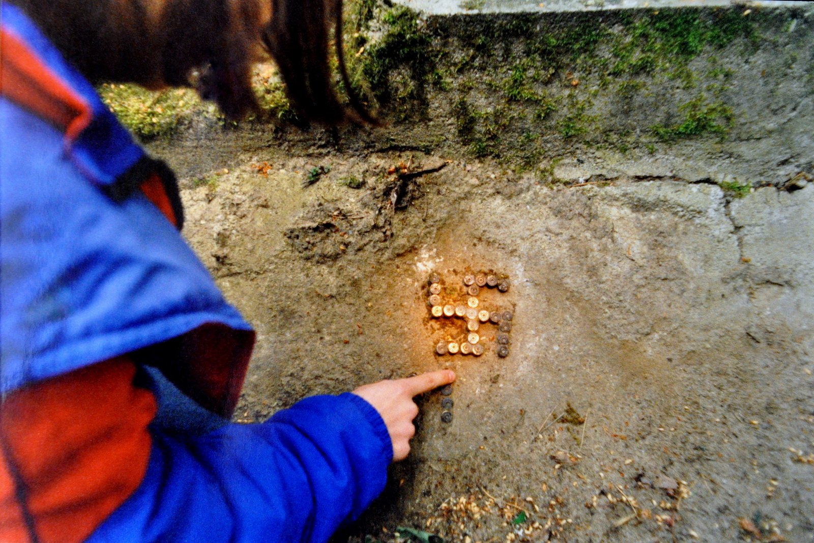 Swastyka z łusek wciśniętych w świeży beton, przez niemieckich budowniczych schronu MG u. PAK 743 w Międzyrzeckim Rejonie Umocnionym ( foto z 1997 r., w 2009 r. swastykę zniszczono )